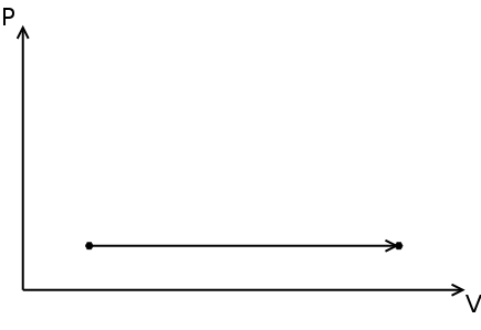 Darstellung einer isobaren Zustandsänderung in einem PV-Diagramm